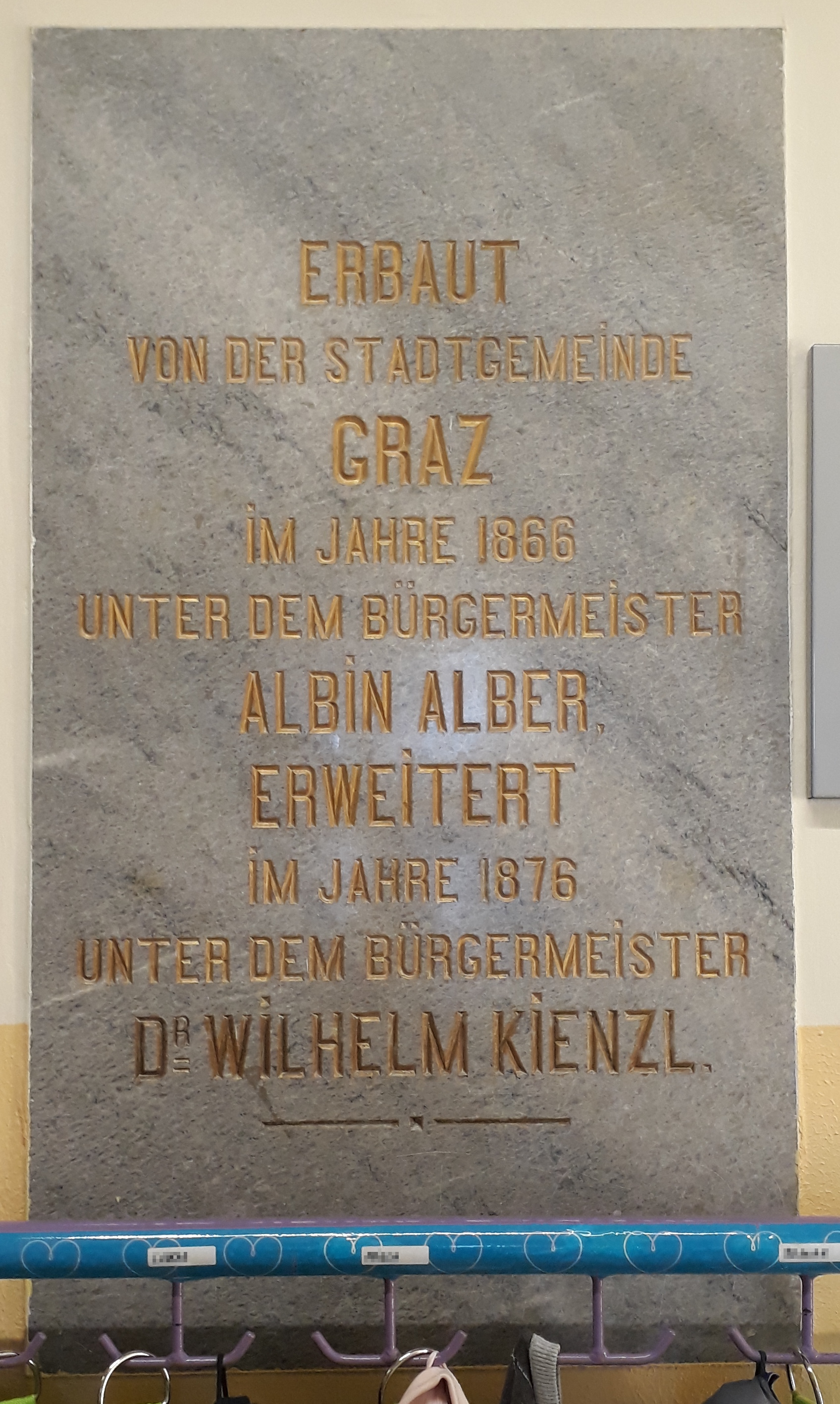 Gedenktafel im Gebäude der Volksschule Geidorf in Graz Beschreibt die Erbauung und Erweiterung der Schule